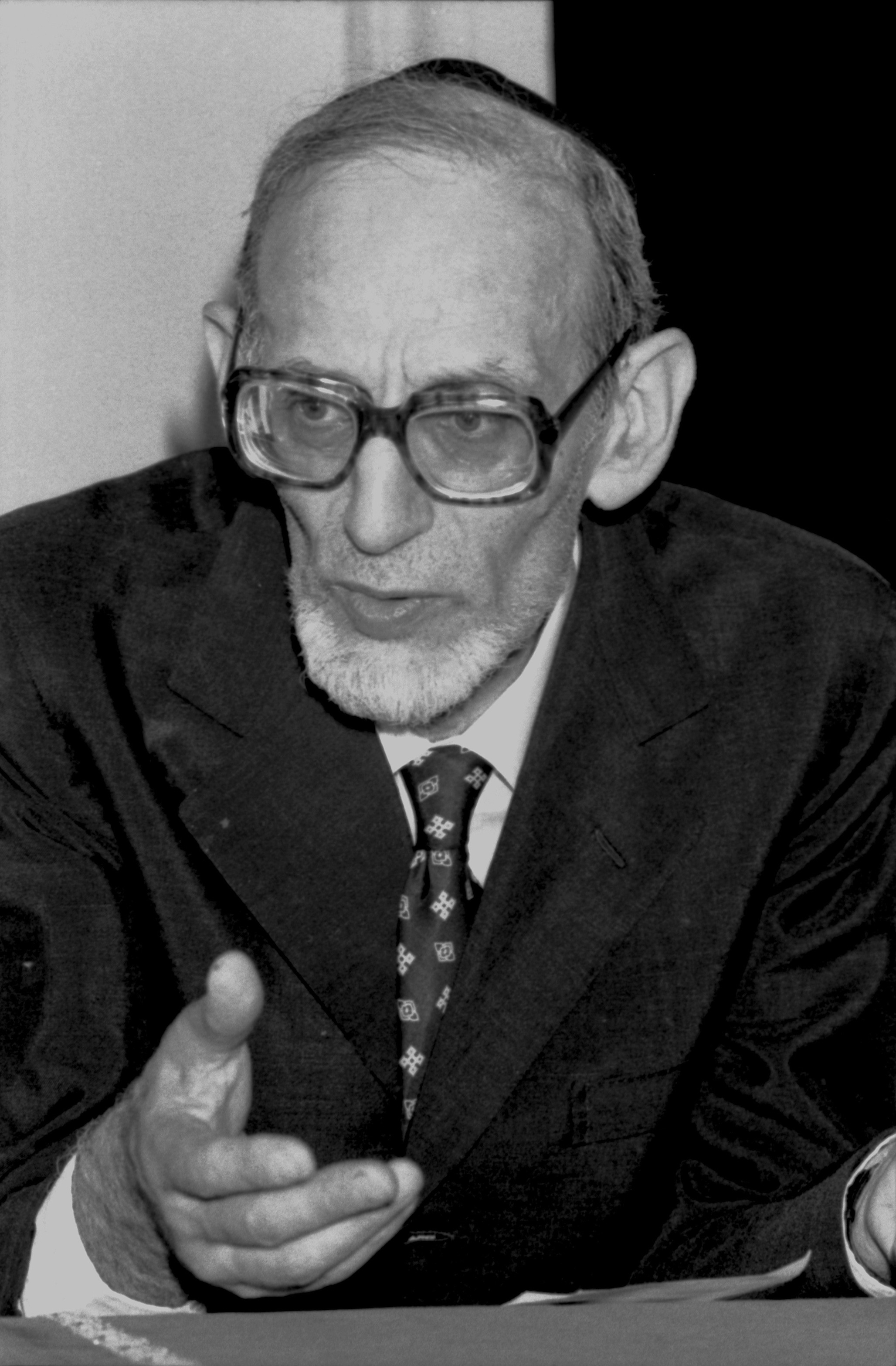 Le Rav Moshé Botschko à la Yeshiva de Montreux, juillet 1979